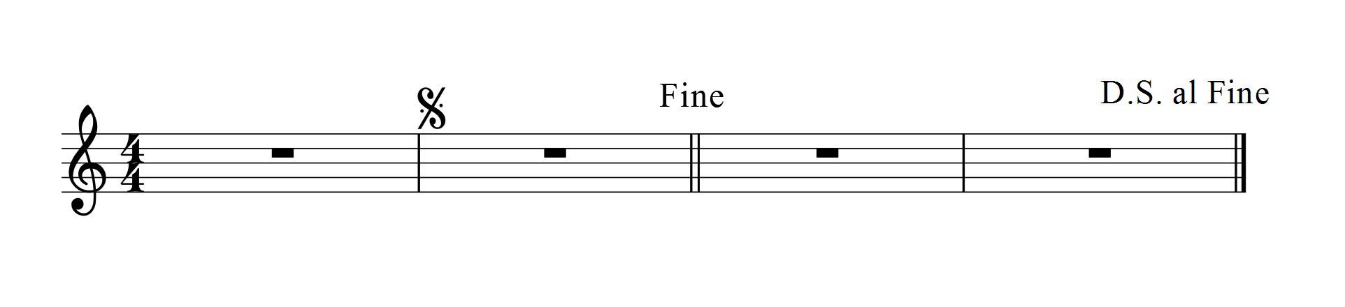 Hecho con MuseScore